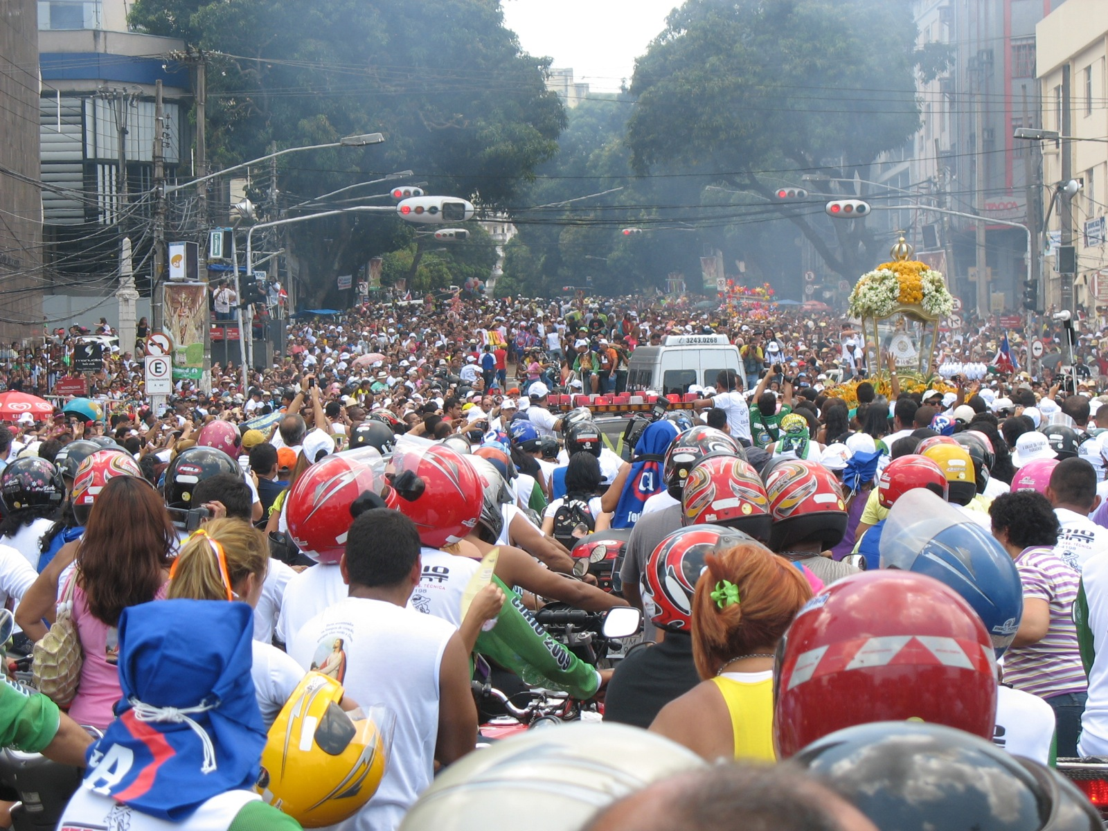 10 de outubro de 2009: a procissão das motos é um entre os inúmeros aglomerados oficiais do Círio. Muita gente.